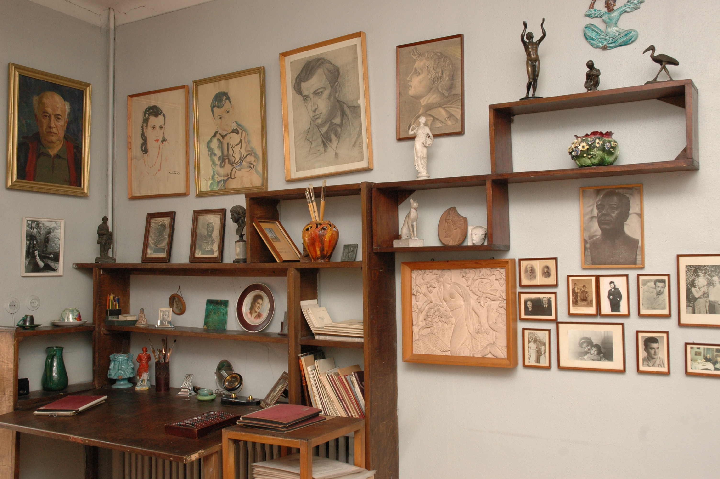 Արա Սարգսյան և Հակոբ Կոջոյան տուն-թանգարան